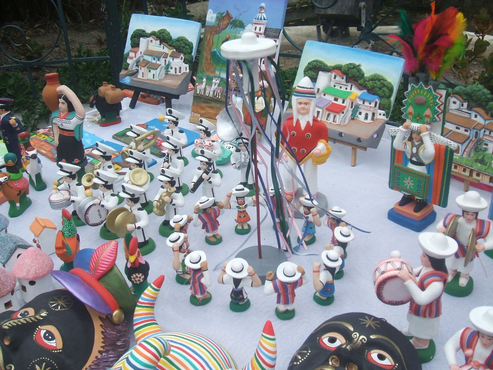 Figuras de Mazapán elaboradas en Calderón